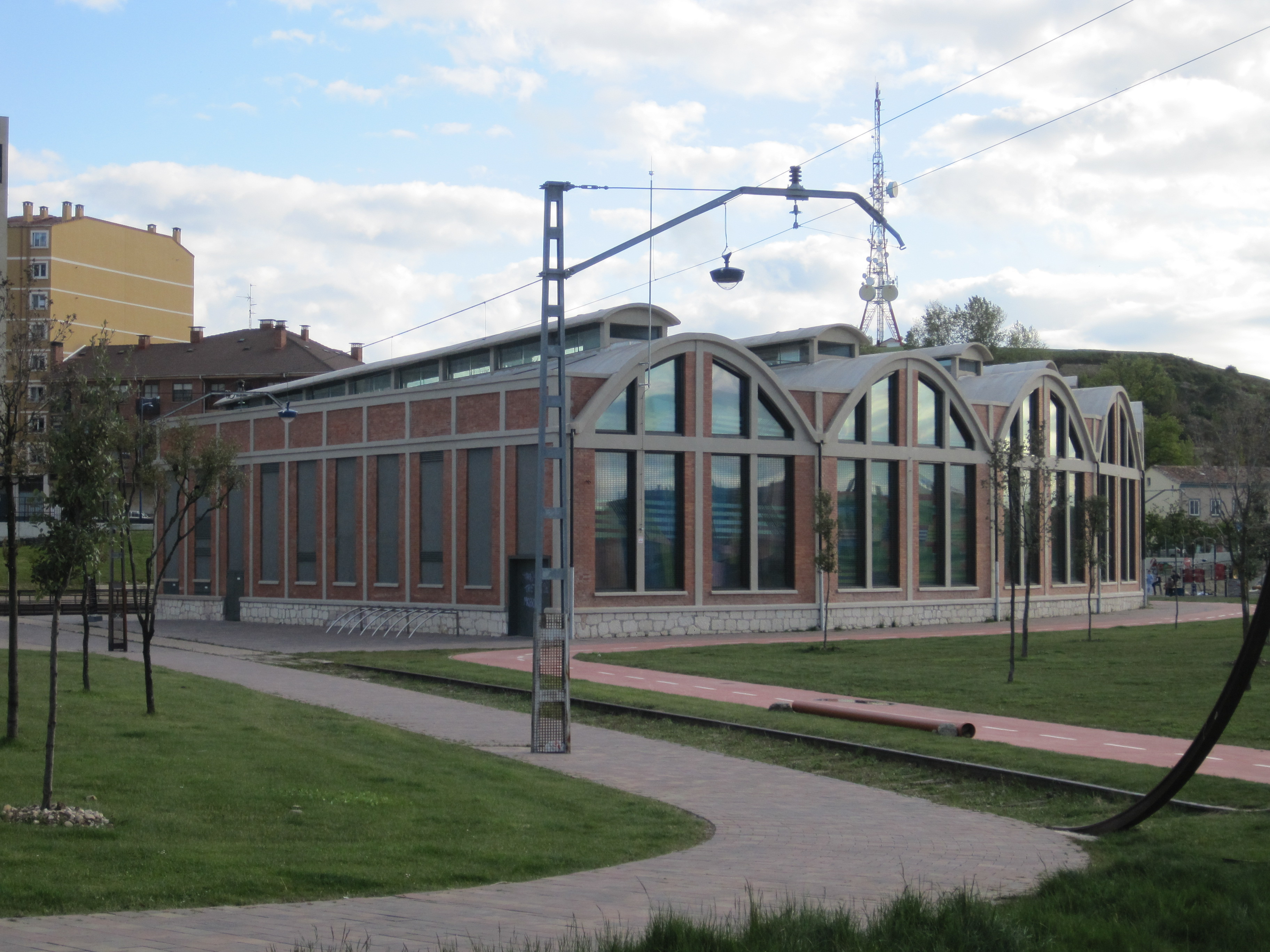 Vista norte del Hangar, centro de creación musical de Burgos.